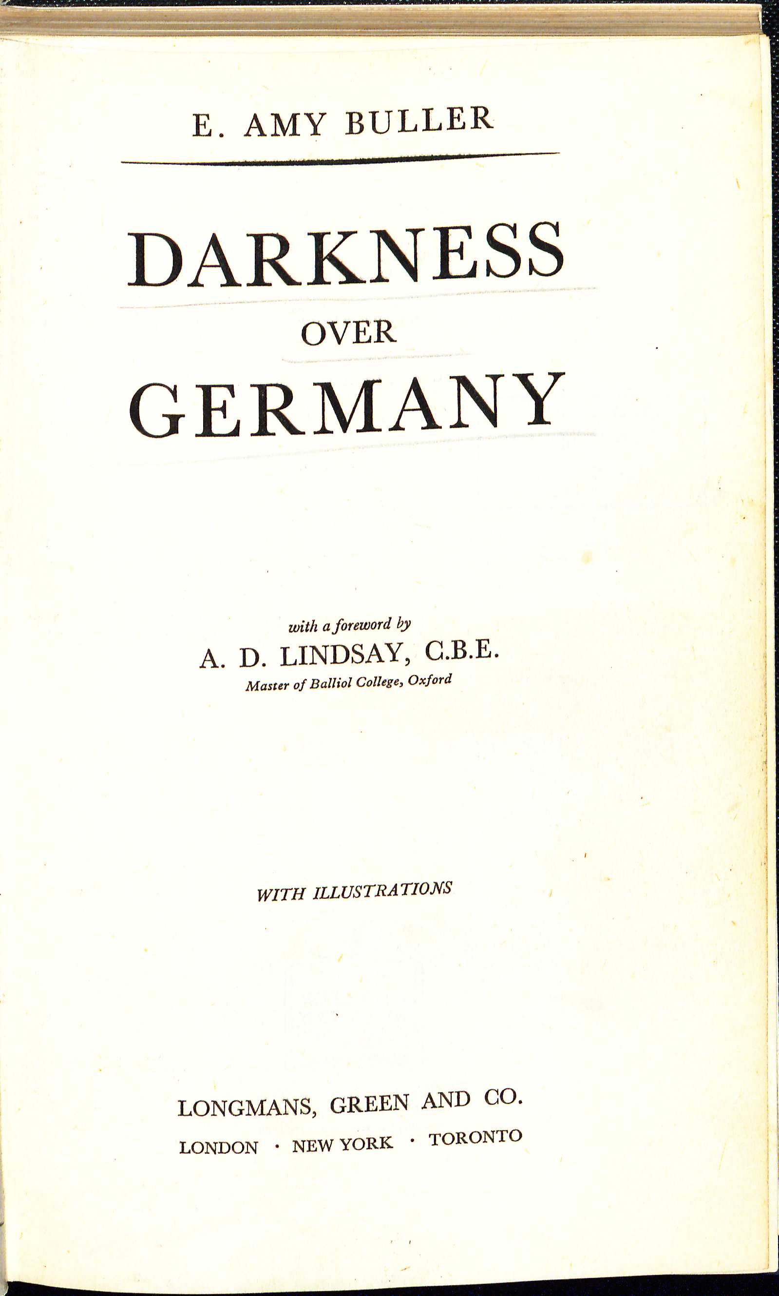 E. Amy Buller: Darkness over Germany. London: Longmans, Green, 1943